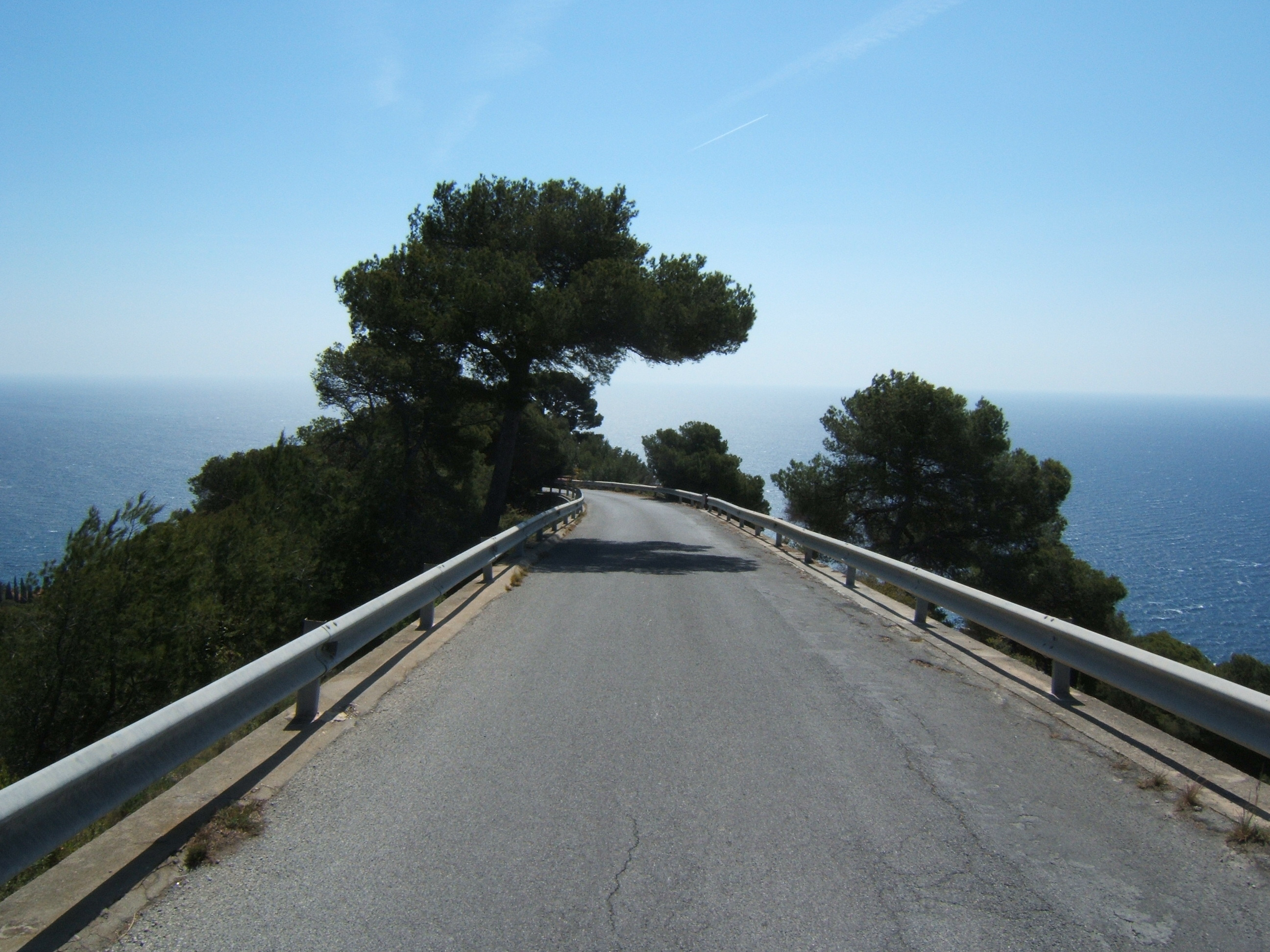 A Grimaldi, en Italie près de la frontière française, cette route secondaire, au-dessus de la route "Corso Mentone", semble plonger dans la Mer Méditerranée.